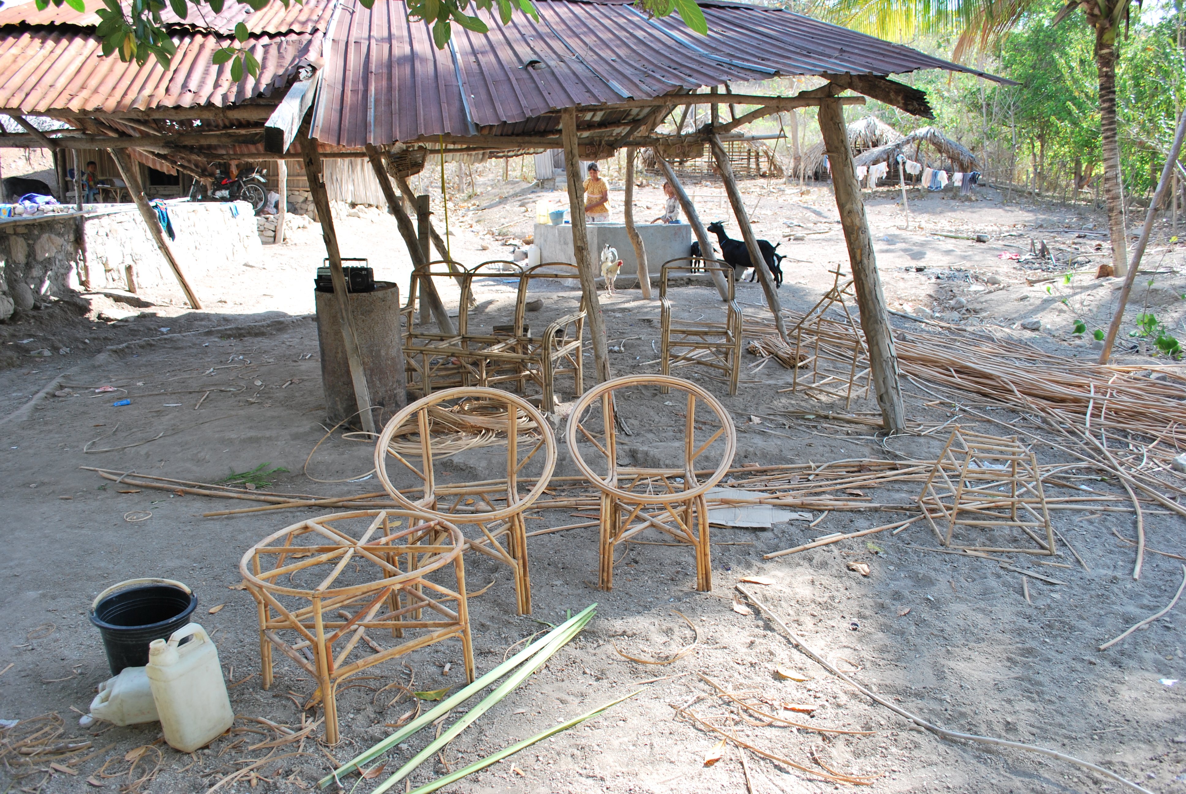 Möbelproduktion aus Binsen in Cova Lima